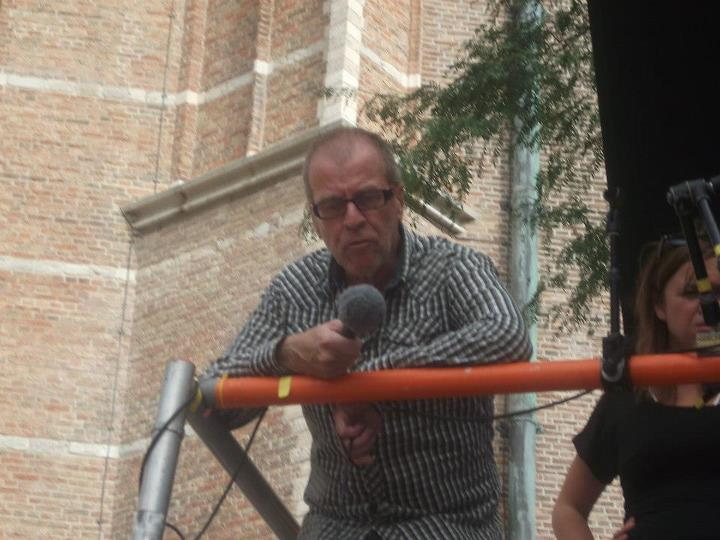 Nederlands filmregisseur Ben Sombogaart op de set van Koning van Katoren (2012) voor de Laurenskerk in Rotterdam.